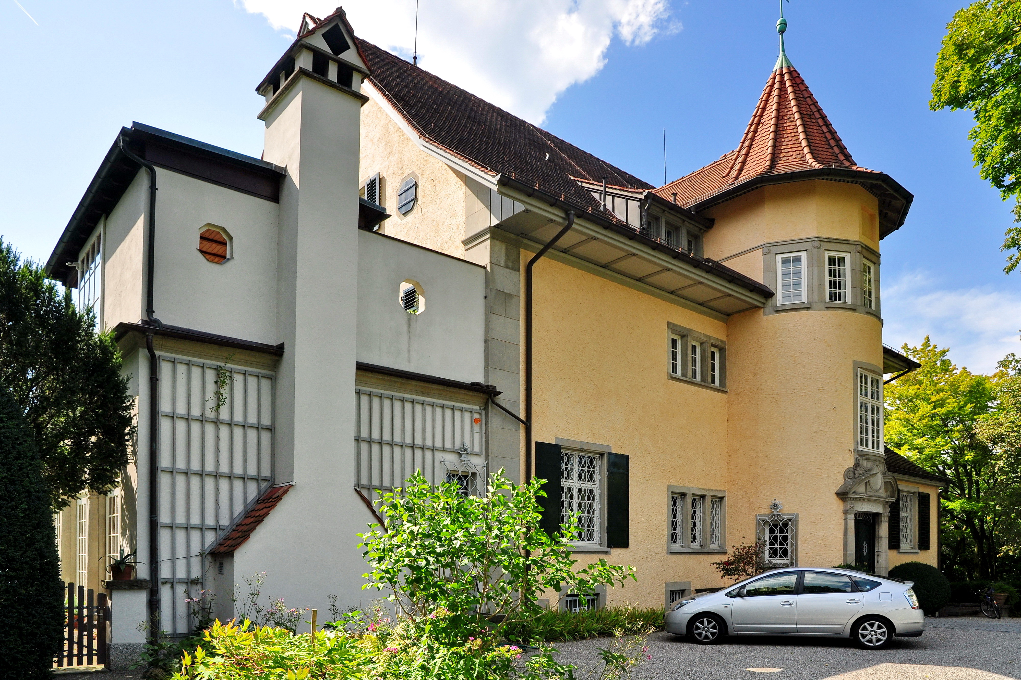 Wohnhaus von C. G. Jung, Seestrasse 228 in Küsnacht (Switzerland)